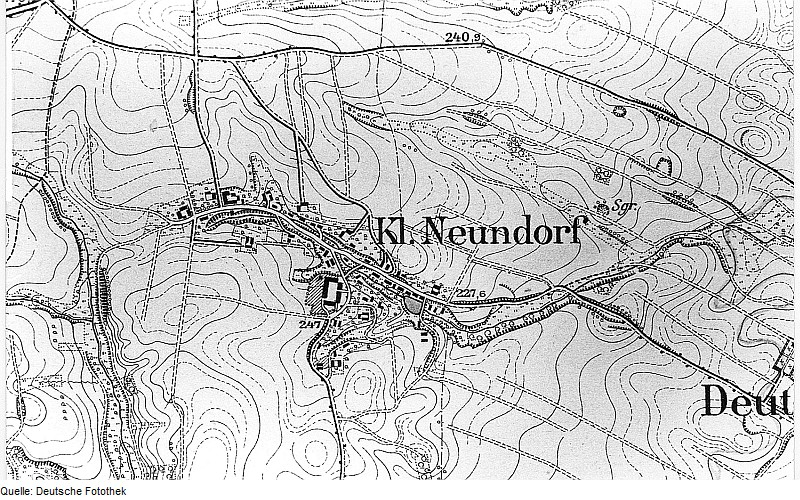 Original image description from the Deutsche Fotothek Görlitz-Klein-Neundorf. Meßtischblatt, Sekt. Görlitz, 1886